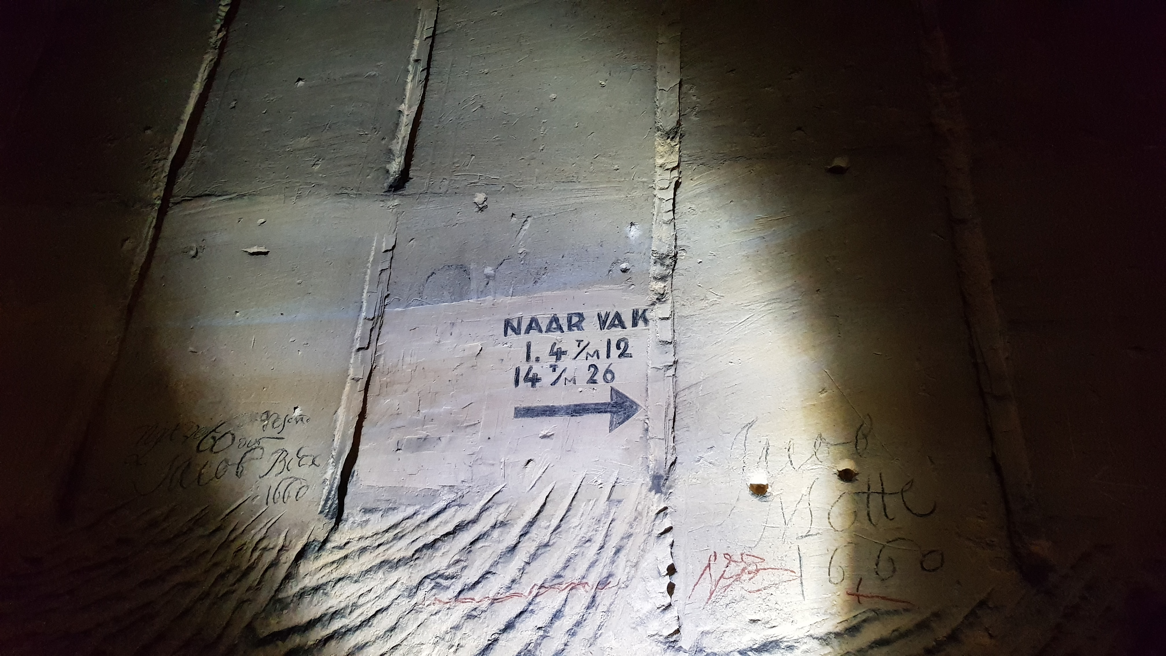 Gangenstelsel Zonneberg in de Sint-Pietersberg, Maastricht, Nederland